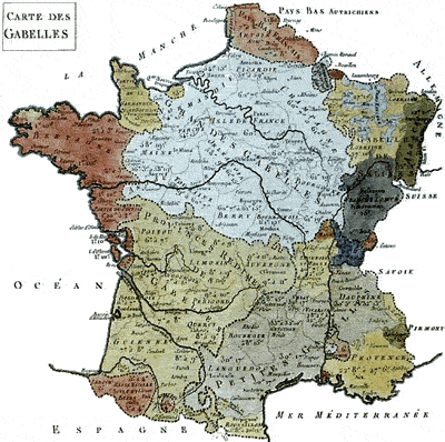 Karte der Salzsteuer (gabelle) in Frankreich des 18. Jahrhunderts